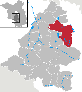 Zossen in Brandenburg (Country) - District Teltow-Fläming